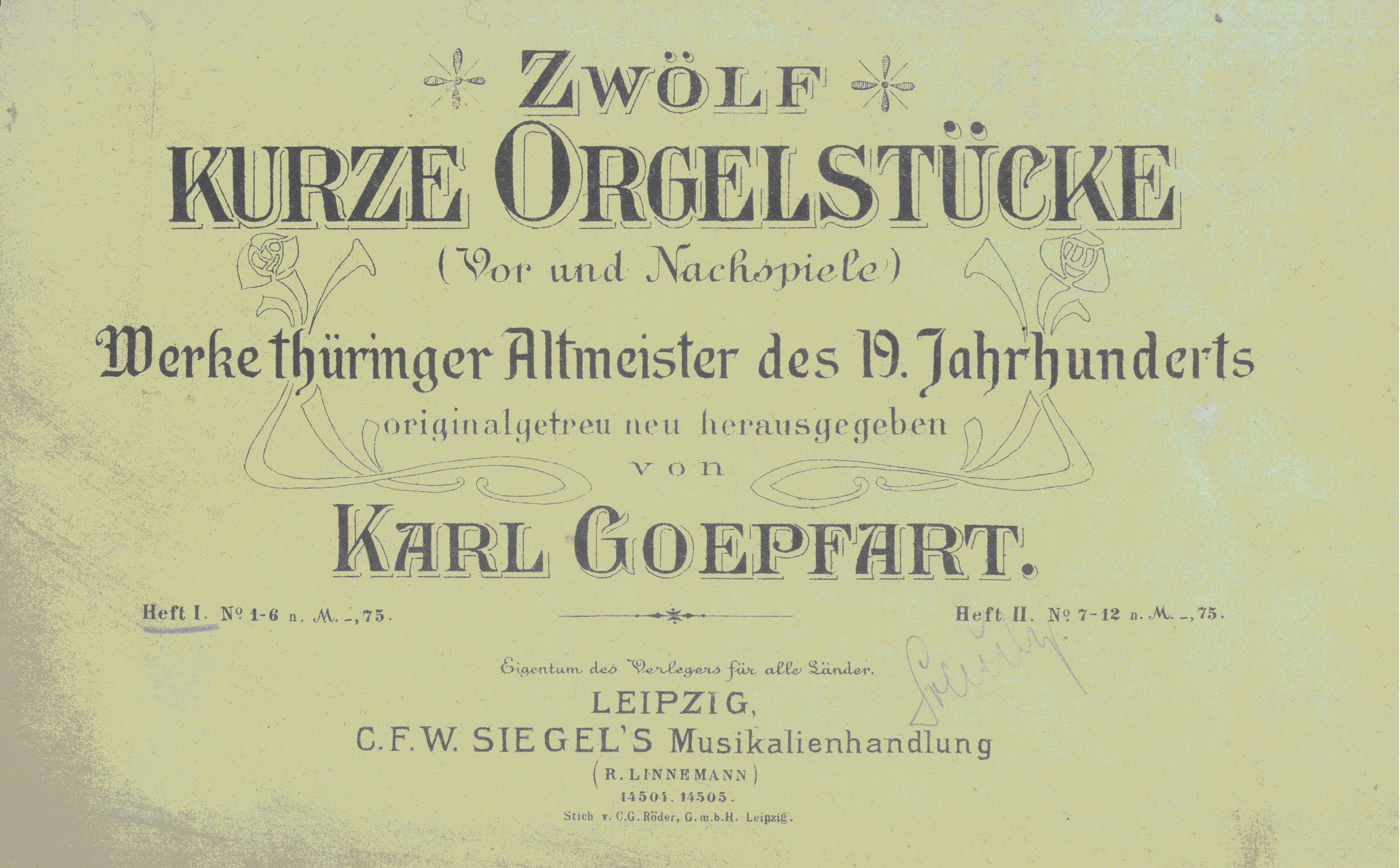 Titel einer Werkausgabe Karl Goepfarts